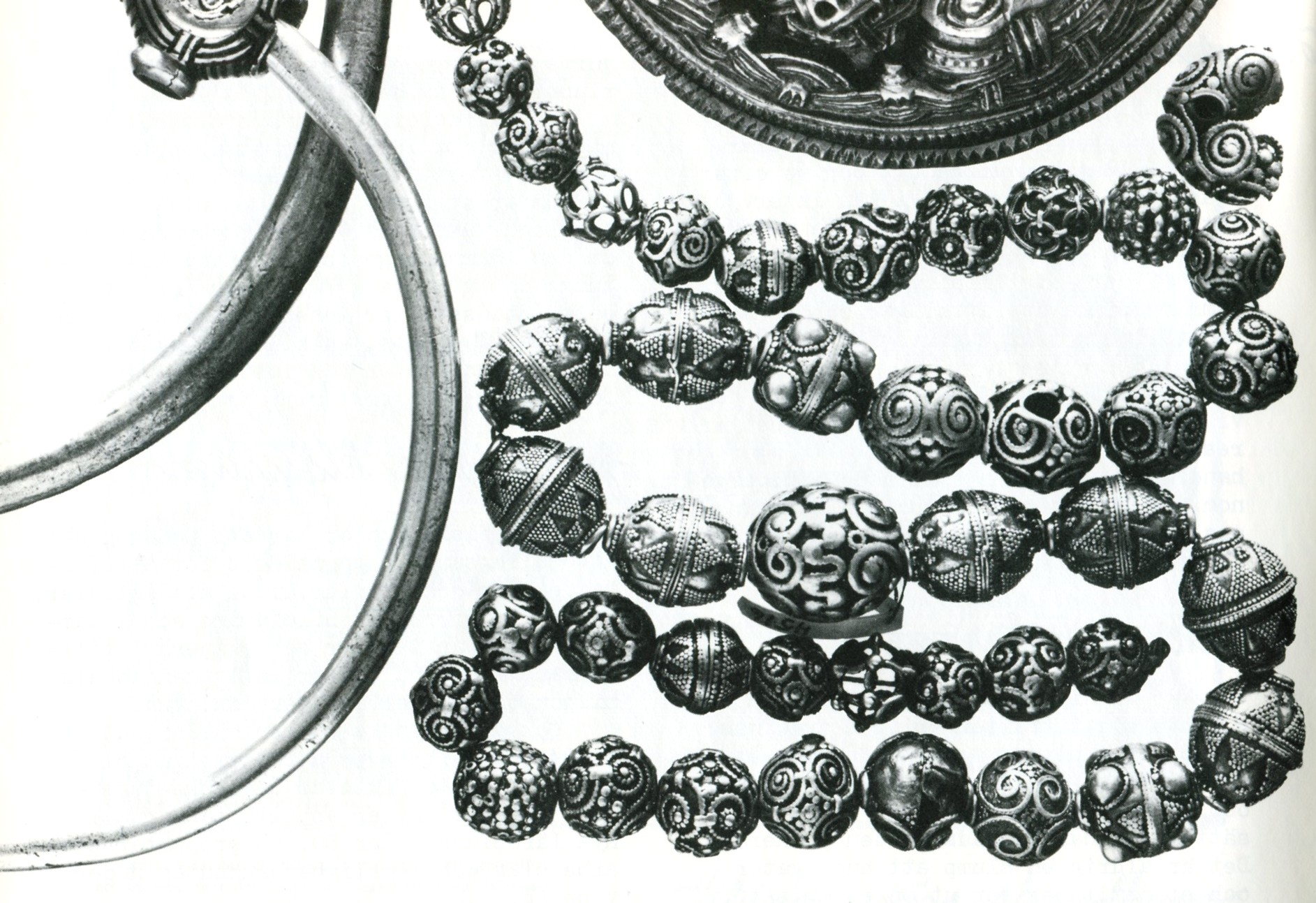 Vårbyskatten